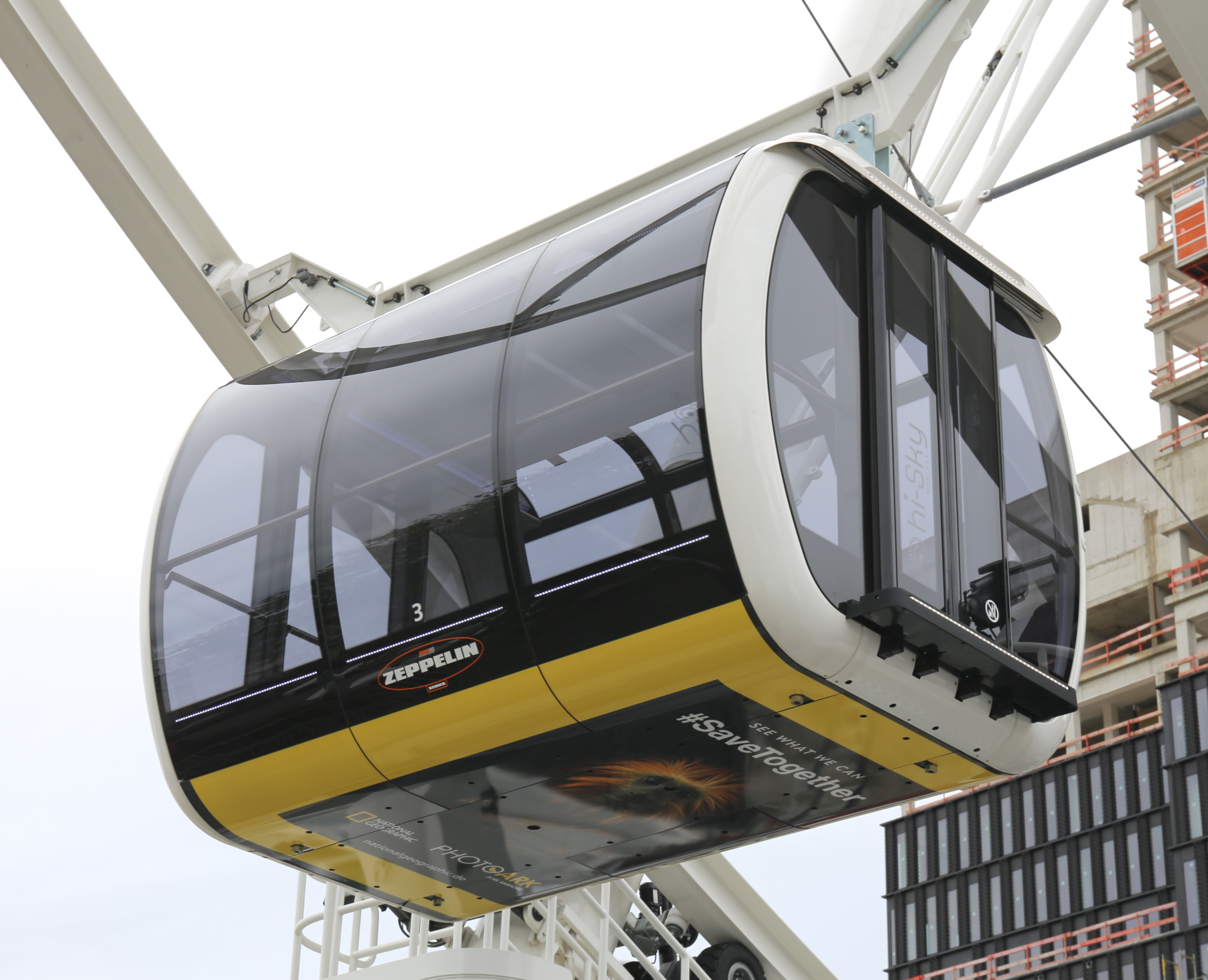 Hi-Sky, ein 78 m hohes Riesenrad im Münchner Werksviertel (Stadtteil Berg am Laim)